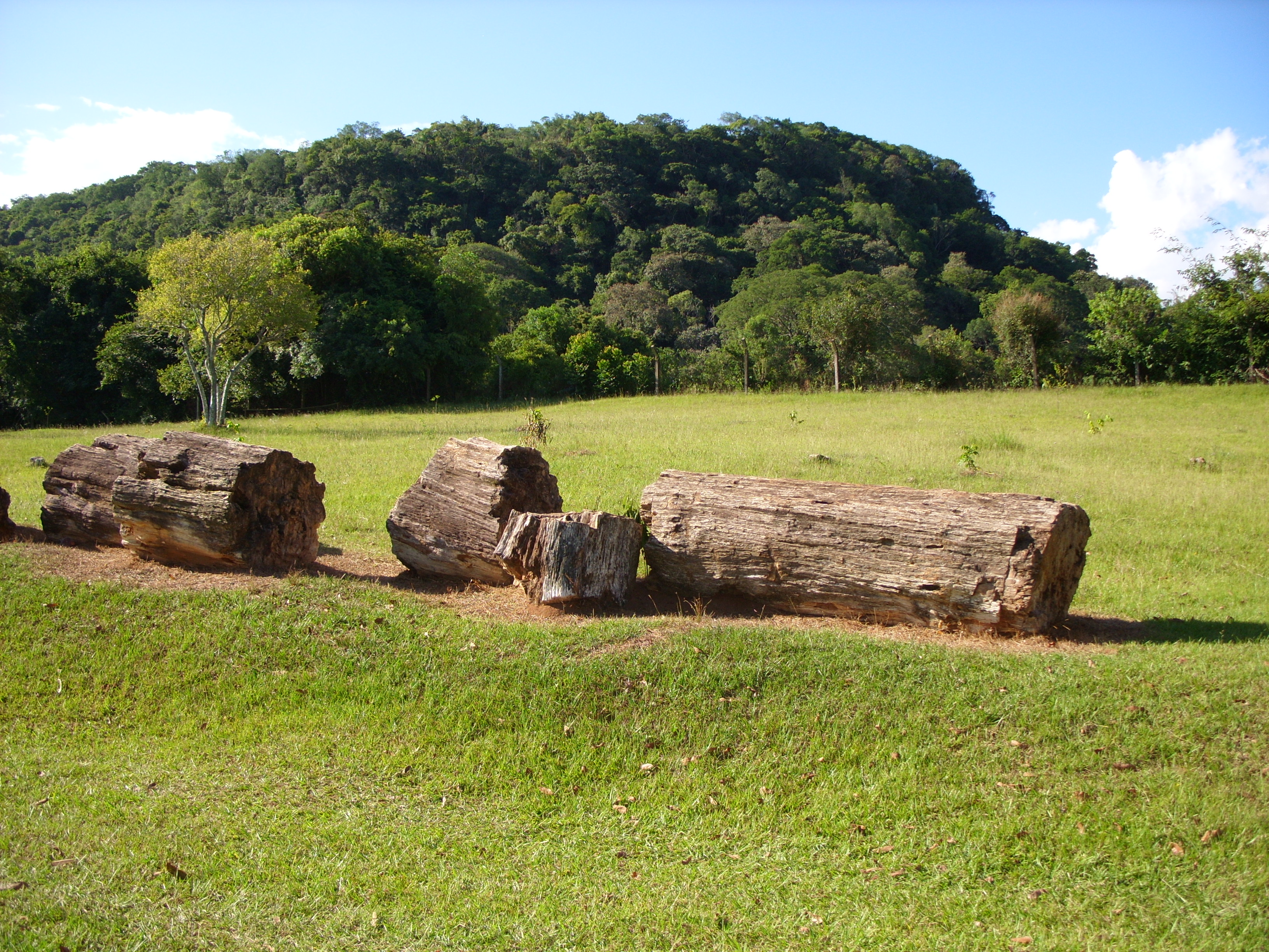 Parque paleobotânico, localizado na cidade de Mata, Rio Grande do Sul, Brasil.